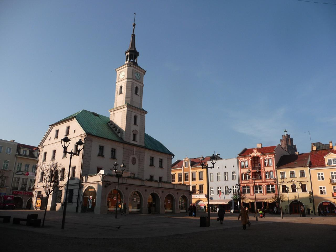 Gliwice, ratusz, XVIII/XIX